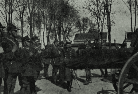 Przegląd 10 pac